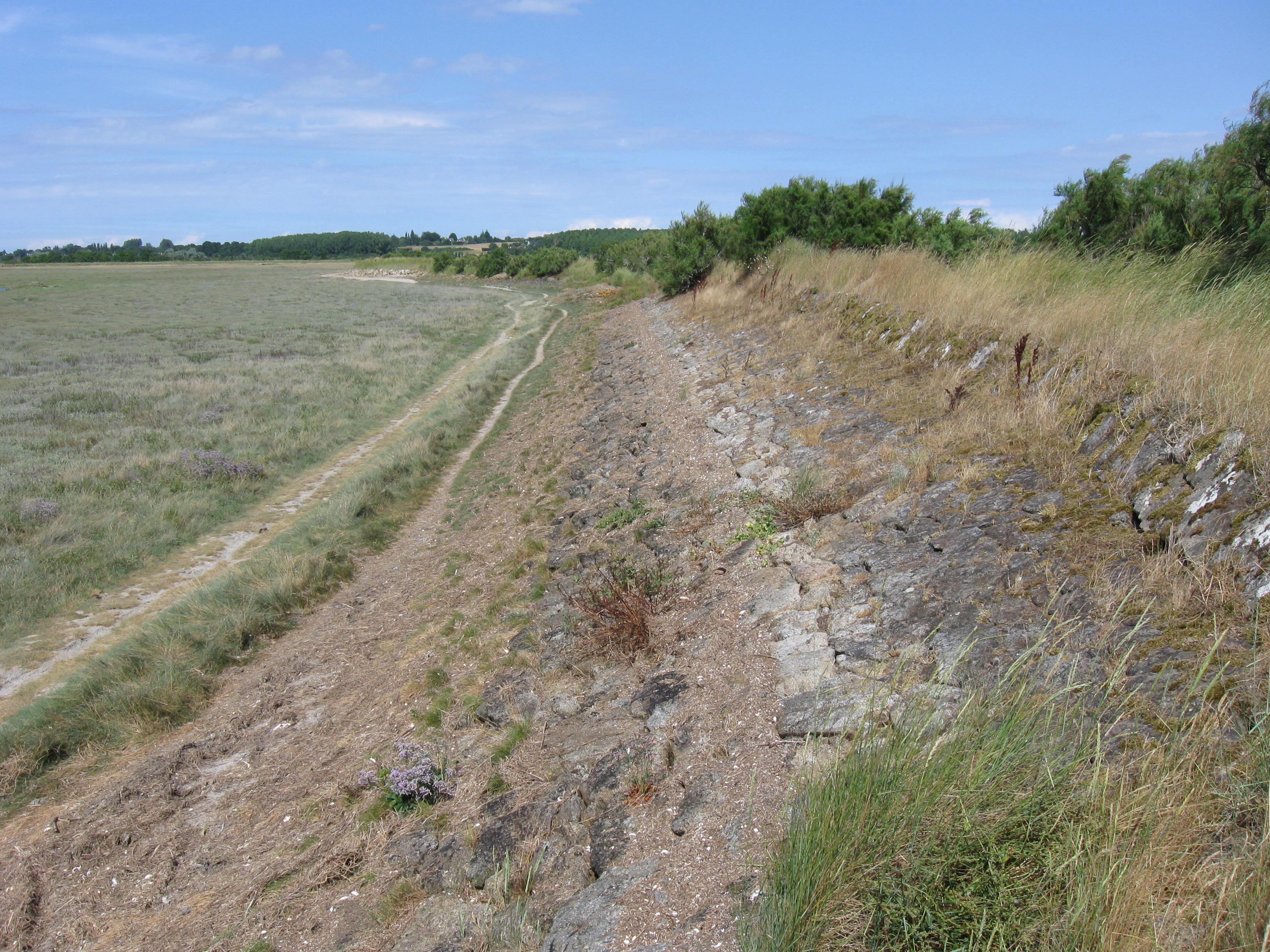 Une digue des polders de la commune de Ploubalay. (Côtes-d'Armor, région Bretagne).